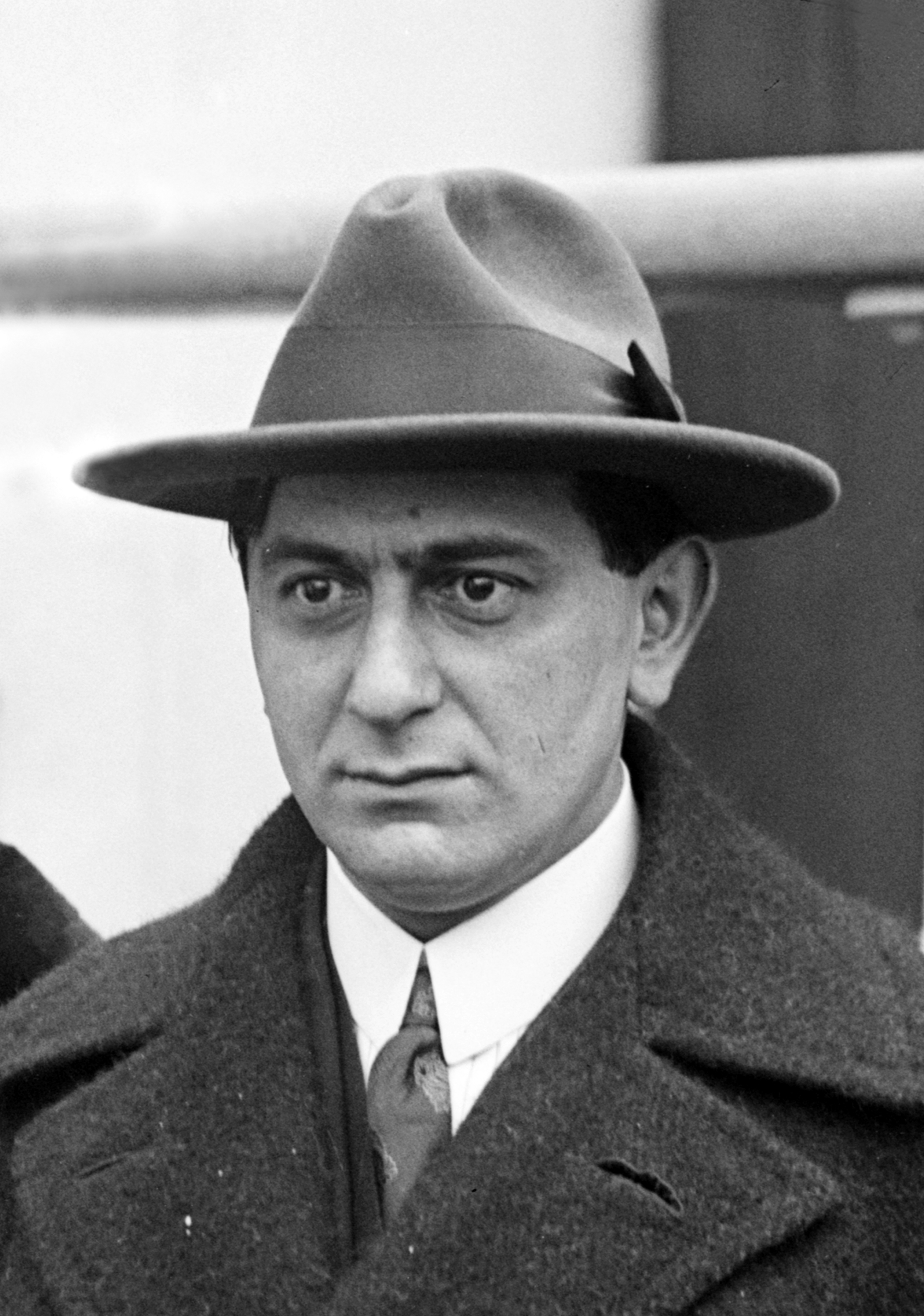 German film director Ernst Lubitsch (1892–1947), see also Ernst Lubitsch.